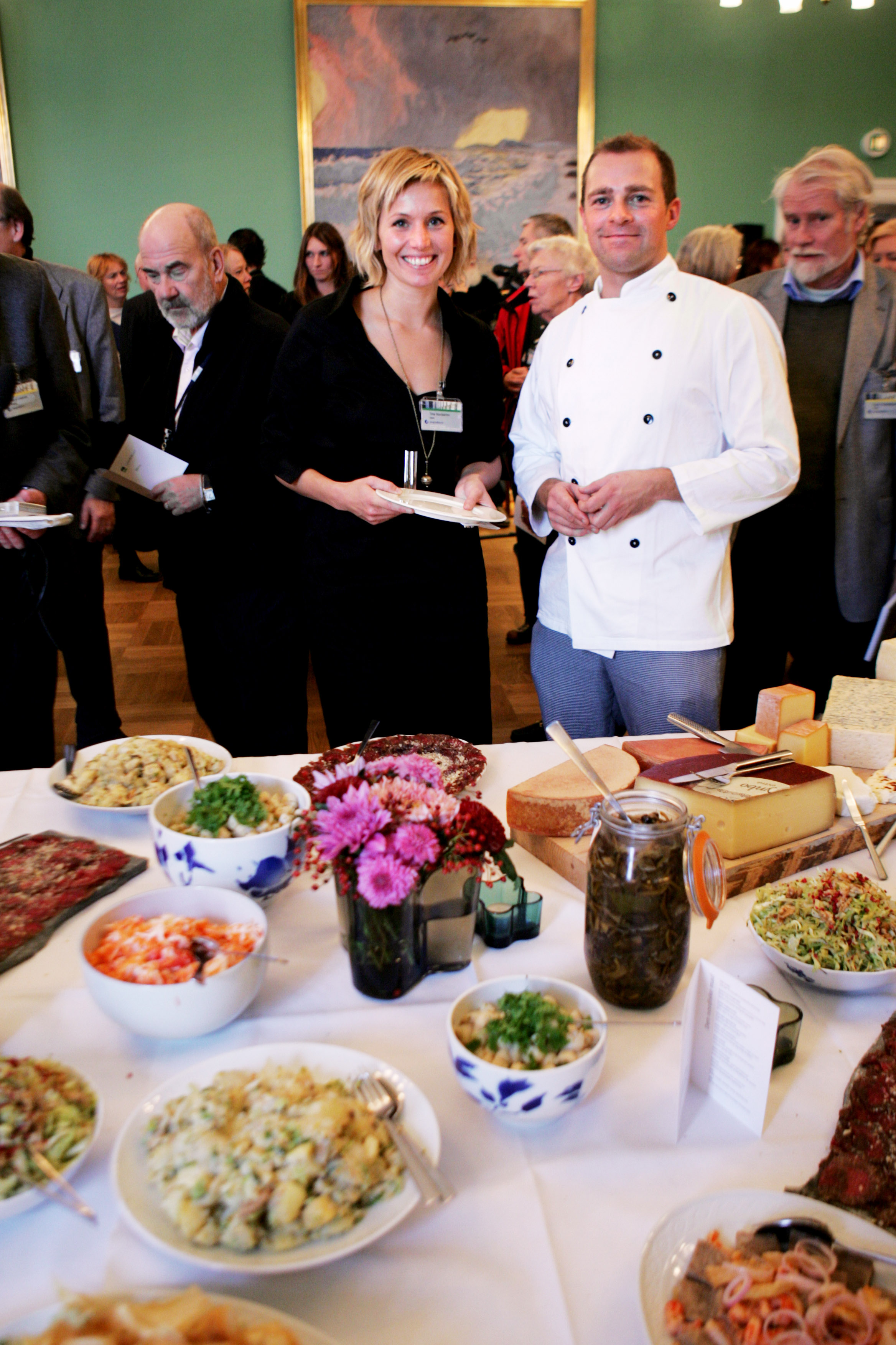 Nordiska Rådets matambassadör Tina Nordström med kocken Ken Møller. Ny nordisk mat under Nordiska Rådets session.